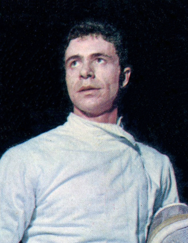 CAMPIONI DELLO SPORT 1968/69 - n. 333 - SALVADORI -ITA-Rec